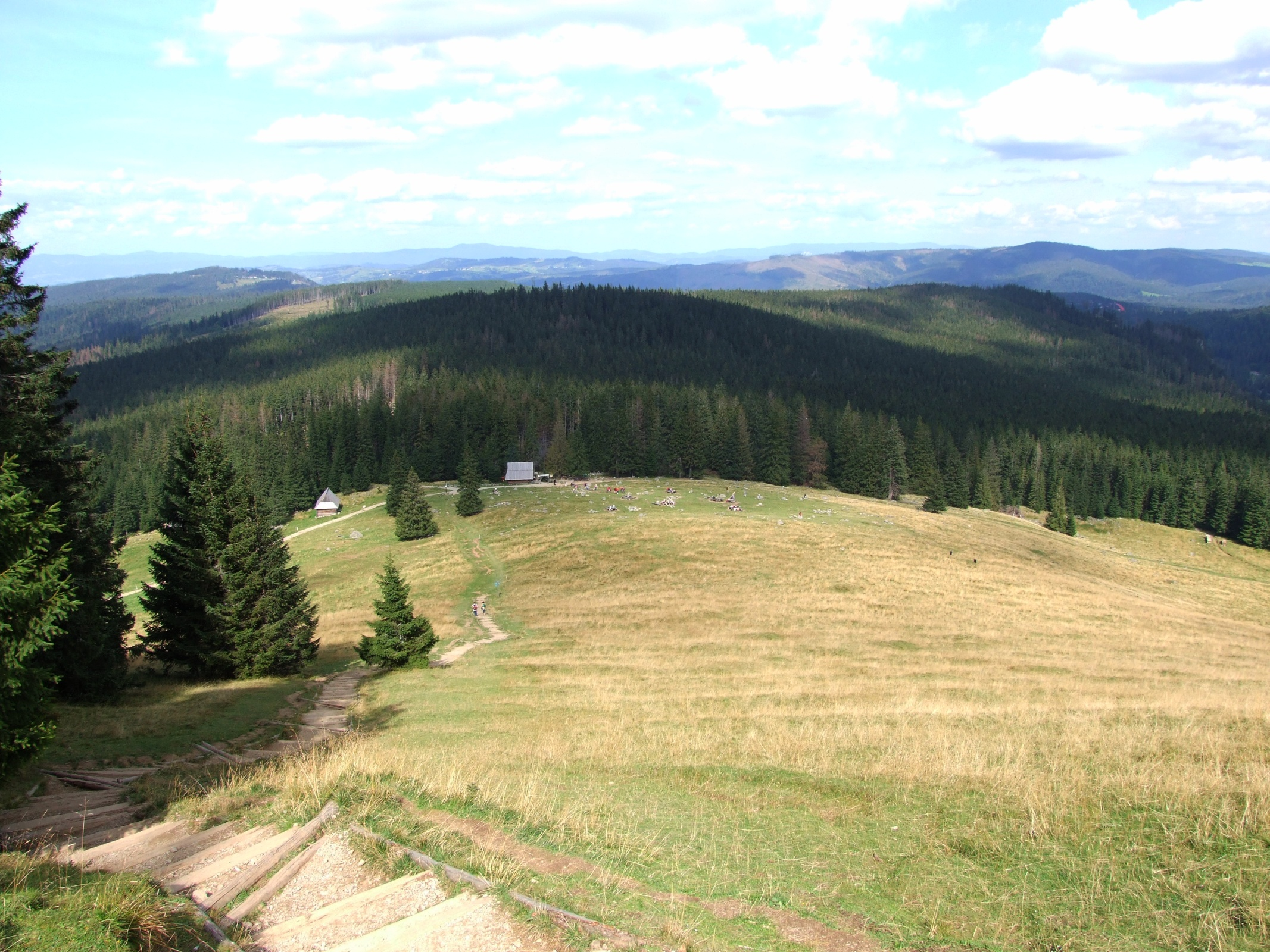 Widok z górnej części Rusinowej Polany (stok Gęsiej Szyi) na Pogórze Spisko-Gubałowskie